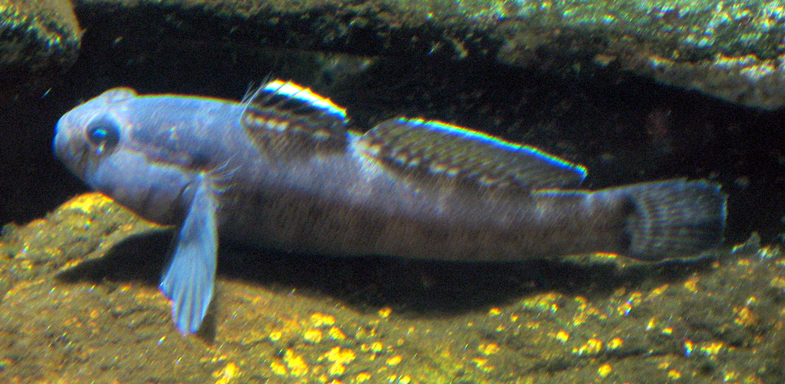 Gobius paganellus in Aquarium Cinéaqua